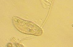 paramécie, photo du Wiki anglais par